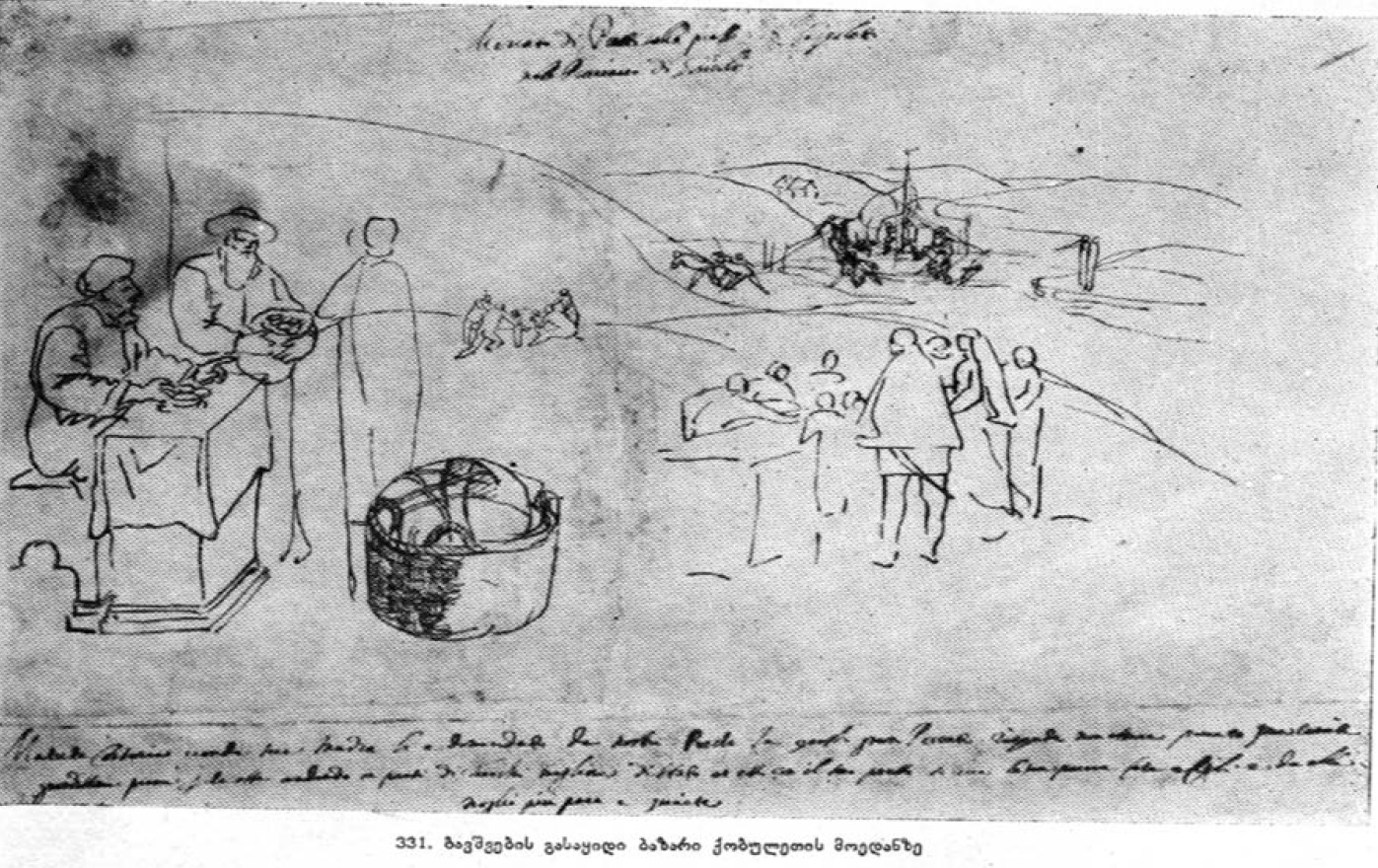 ბავშვების გასაყიდი ბაზარი ქობულეთის მოედანზე